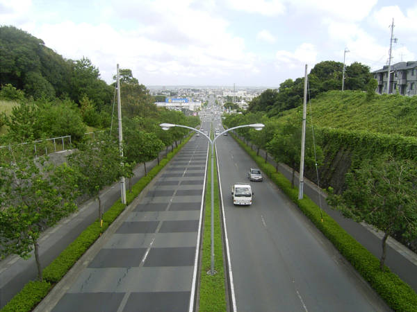 浜松環状線 浜松市半田山付近